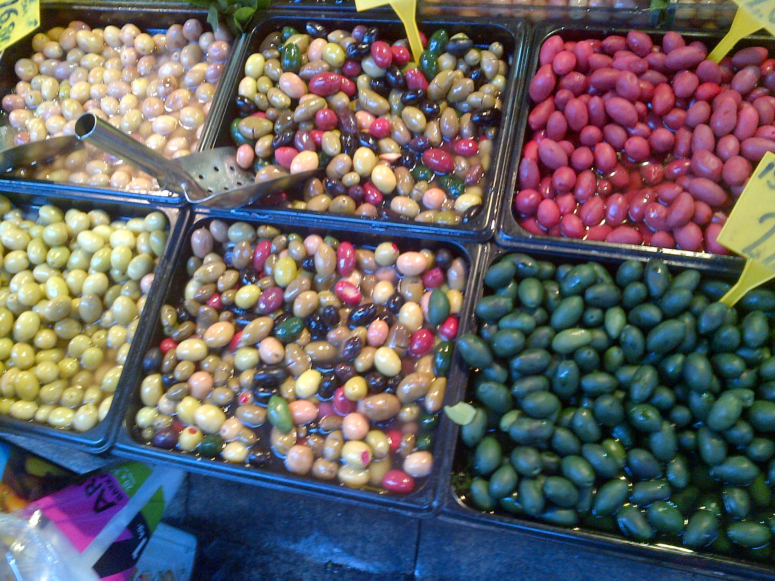 Coloured olives, very fashionable since several years in Turkey, at the historical market of Kadıköy, Istanbul.